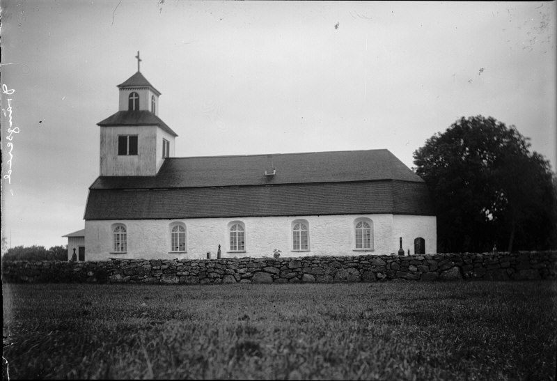 Kyrkan från söder. Snabbinv.